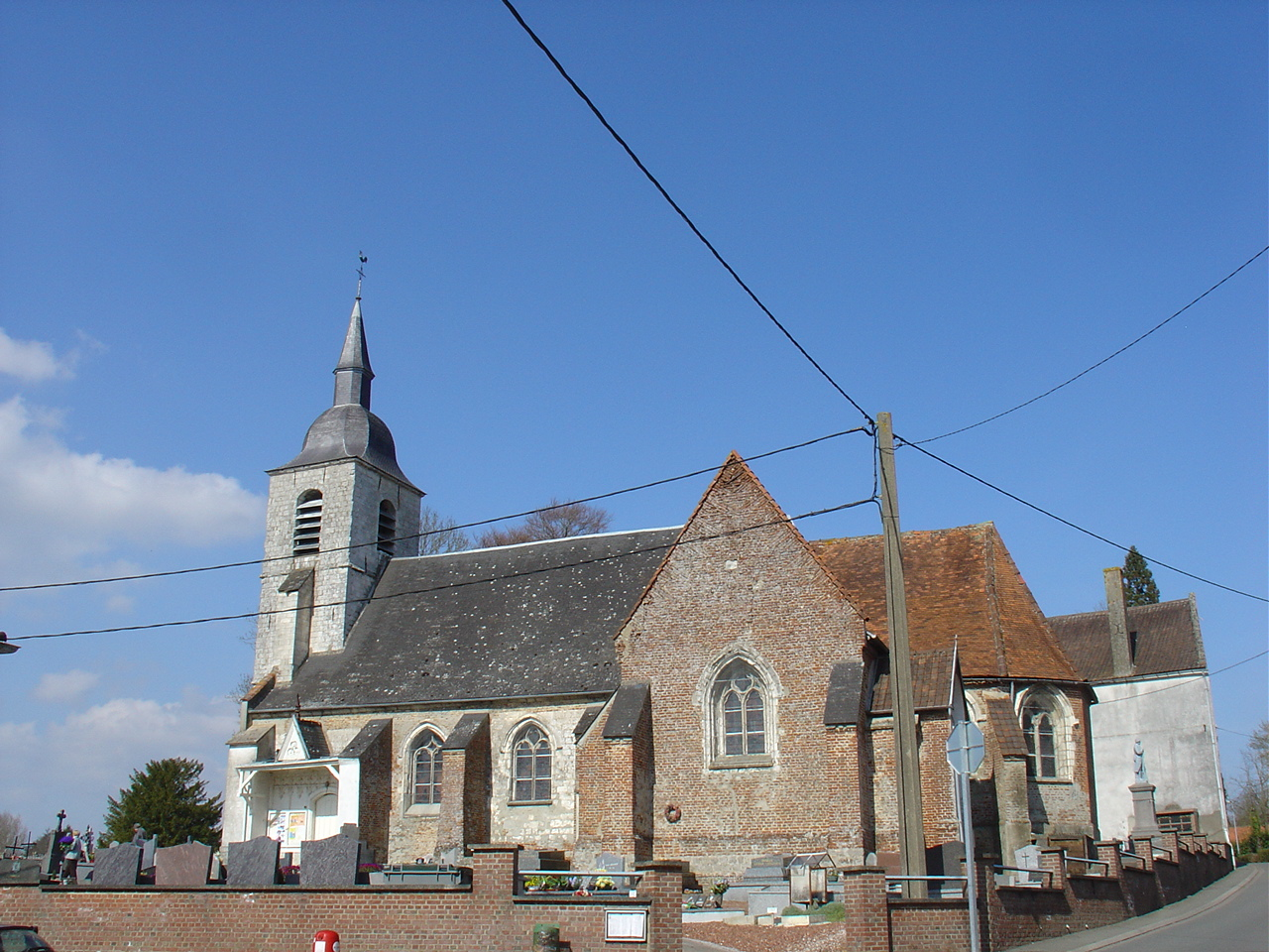 Église de Marconne